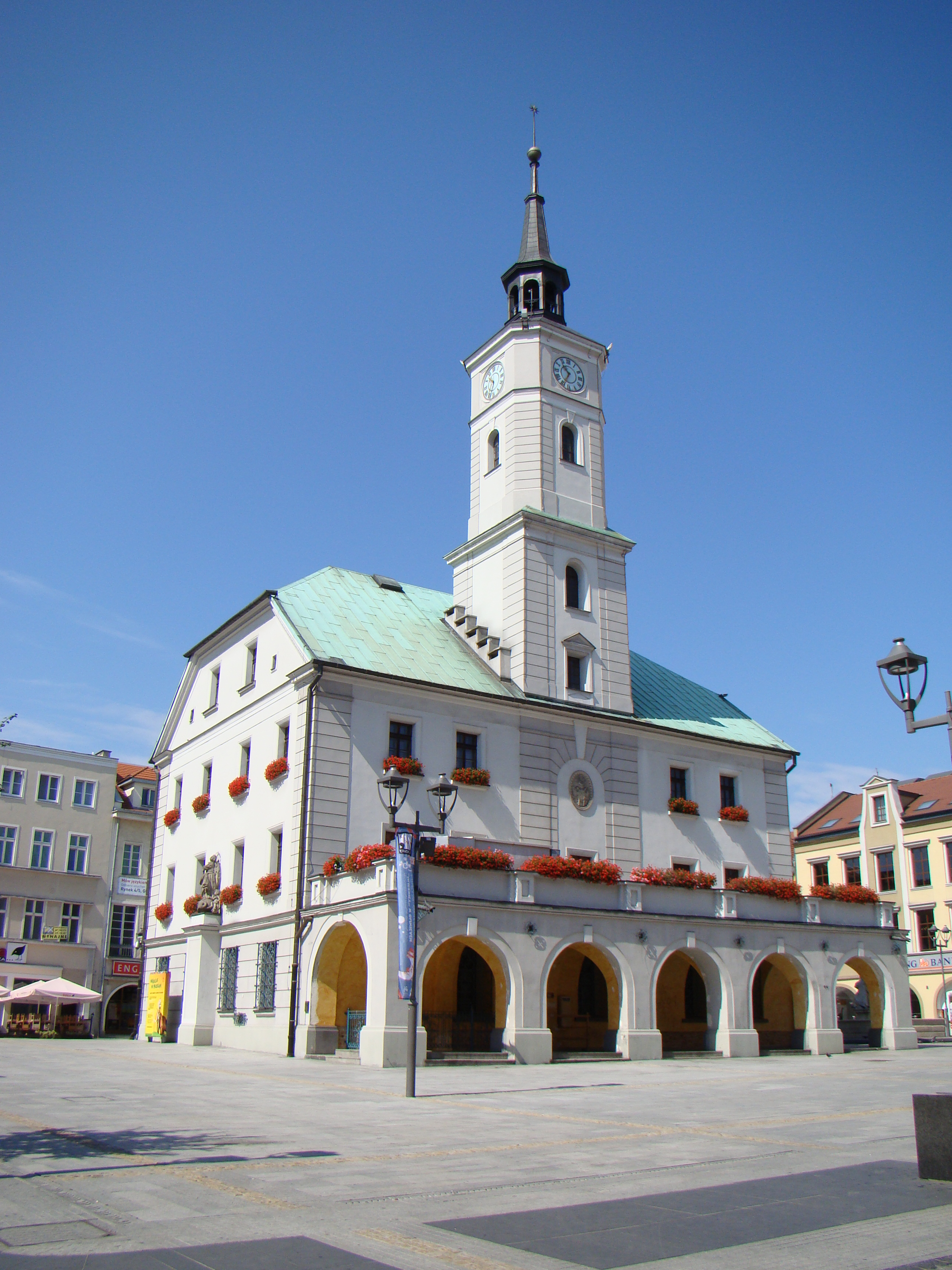 Gliwice, Ratusz z XVIII/XIX wieku, murowany, klasycystyczny, z reliktami z okresu średniowiecza. Granice ochrony obejmują parcelę budowlaną.